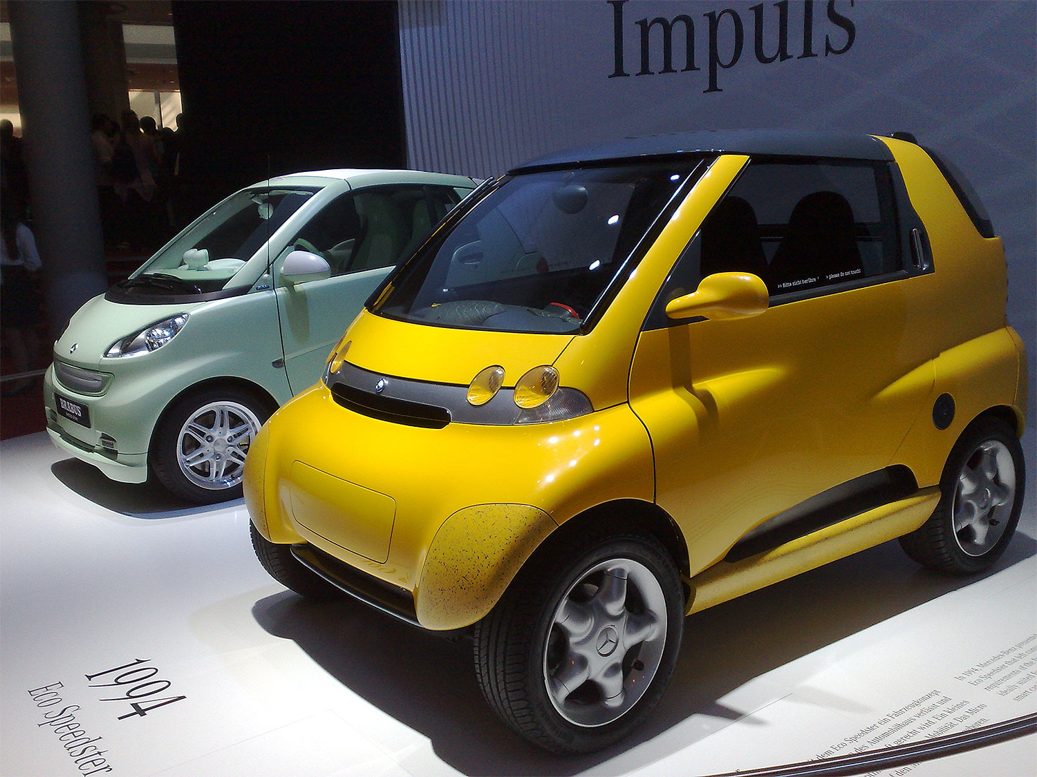 auf der IAA 2009